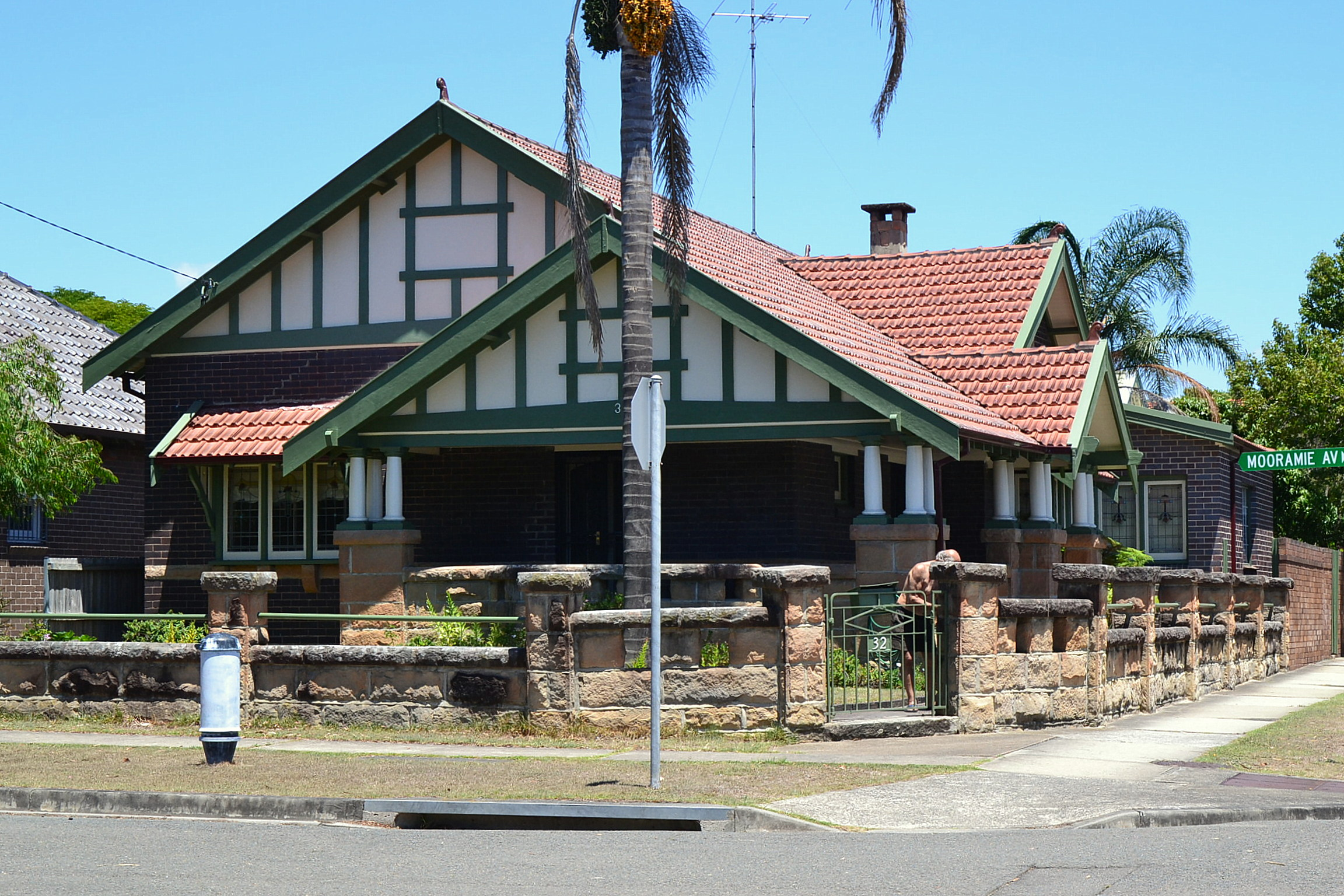 house, Kensington, Sydney